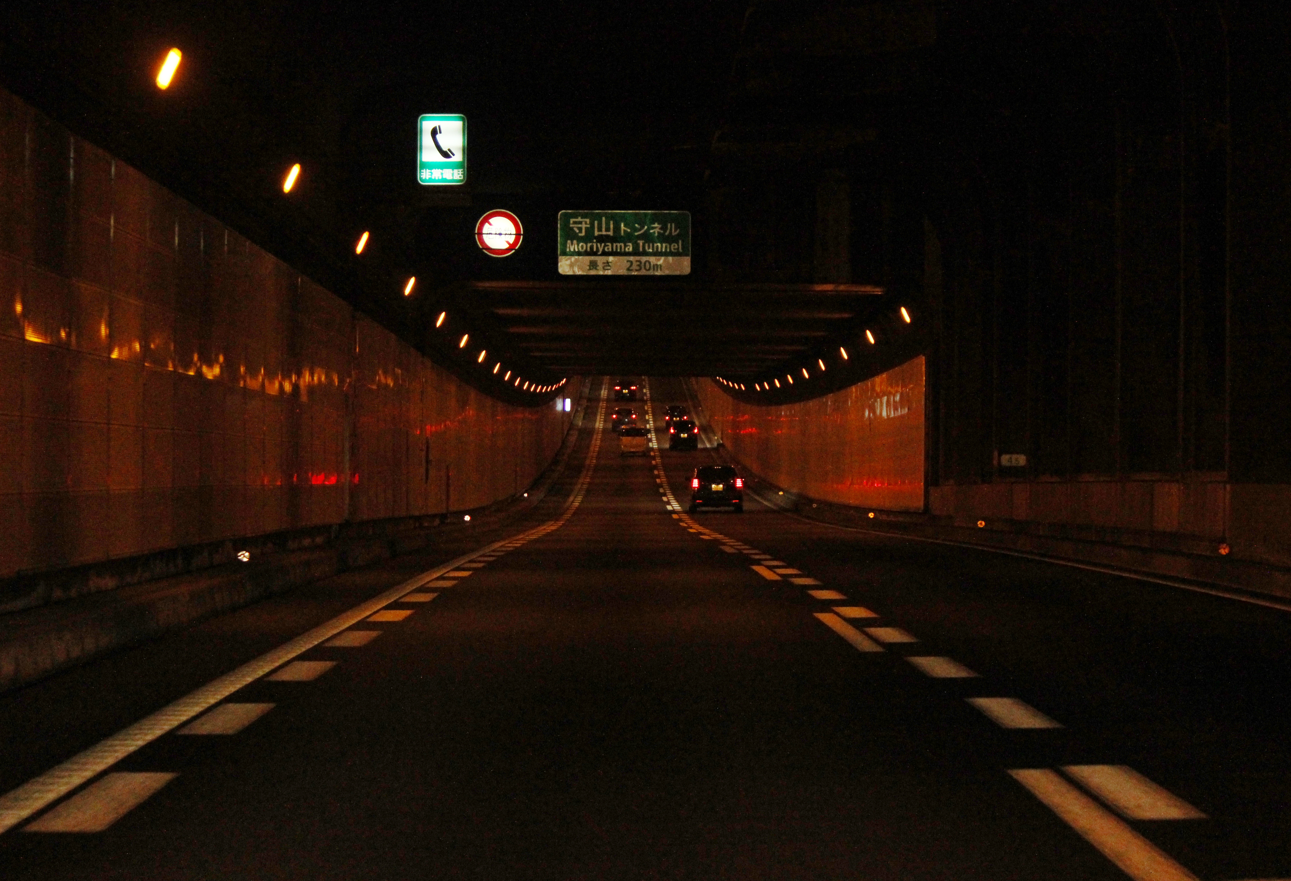 名二環 守山トンネル入口。トンネル入口は半地下部にあるため、地上から目にすることはない。